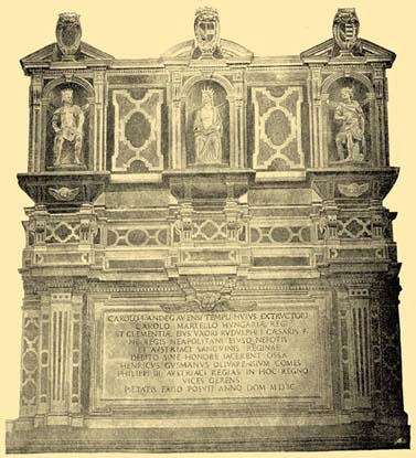 Neapolská hrobka Klemencie Habsburské a Karla Martela